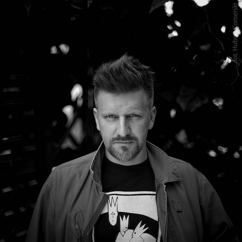 Maciej Kowalewski Polish actor.